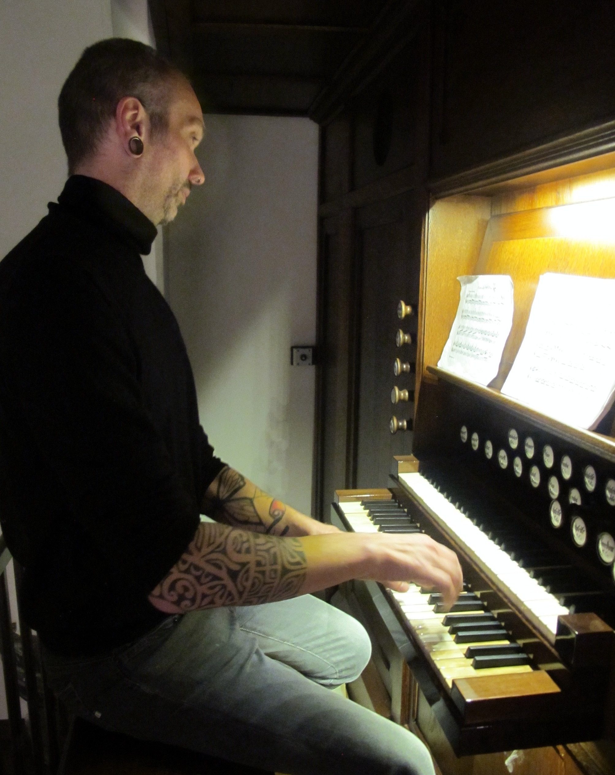 Organist Serge Schoonbroodt an der Müller (Reiffescheid) Orgel von 1862 im Kongresszentrum Kloster Heidberg Eupen, Belgien